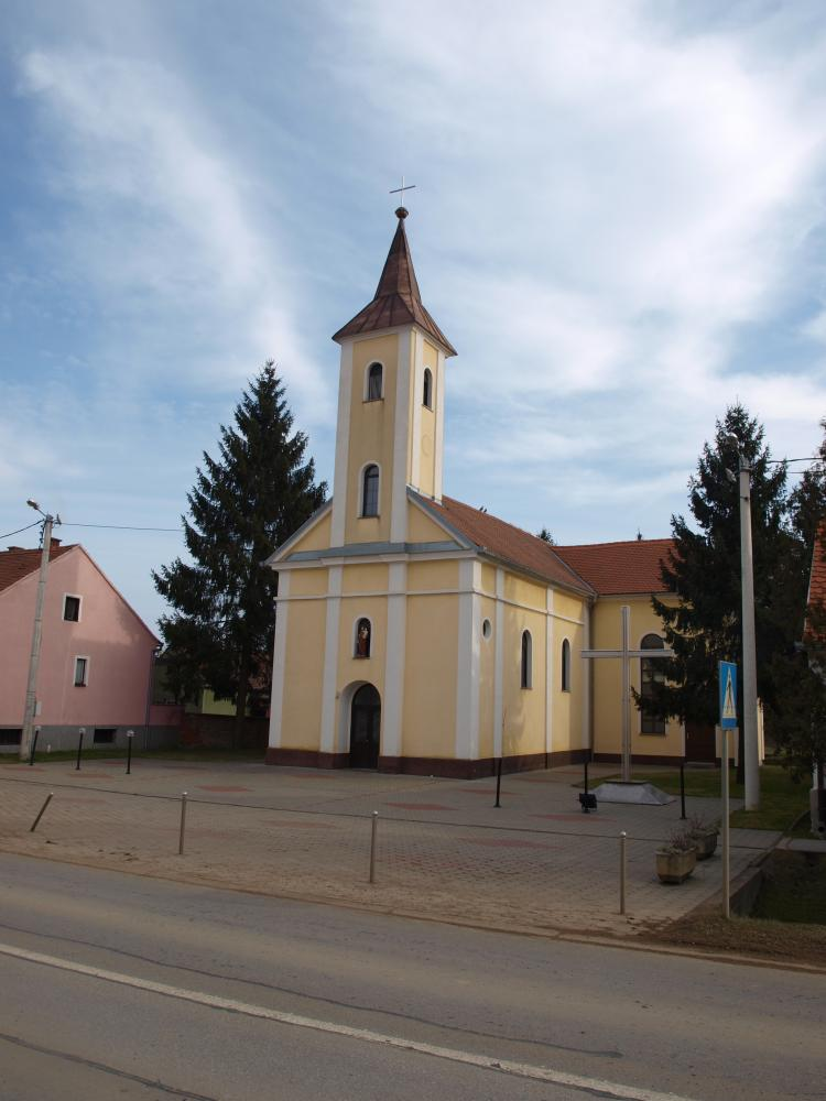 Crkva u Starom Slatiniku, Brodsko-posavska županijawBrodsko-posavska županija.